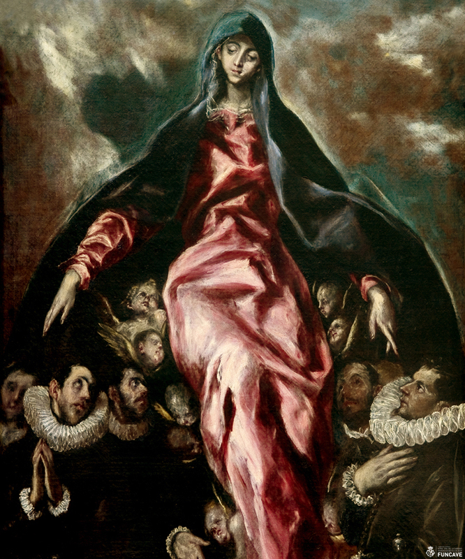 La obra, titulada la Virgen de la Caridad, representa a la Virgen María junto a un grupo de fieles. Debía ser uno de los cuadros más importantes de la composición, donde El Greco intenta mostrarnos la virtud de la Caridad a través de una iconografía de raigambre medieval sobre la Virgen de la Misericordia. En el centro de la composición se encuentra la imponente Virgen abriendo su manto y cobijando a un grupo de fieles ataviados con gola castellana, siguiendo la moda de la época; siendo algunas de estas figuras retratos de caballeros pertenecientes a la nobleza toledana del siglo XVI (entre ellos se encuentra Jorge Manuel Theotocópuli, hijo de El Greco). En este lienzo comprobamos que El Greco utiliza la desproporción típica de su estilo final, un tanto acusada aquí debido a que este cuadro fue diseñado para ser visto desde abajo hacia arriba. Hoy al alcance de los ojos del espectador, parece demasiado desproporcionado, sobre todo, el cuerpo de María con unas piernas monumentales en primer plano concluyendo en una minúscula cabeza.